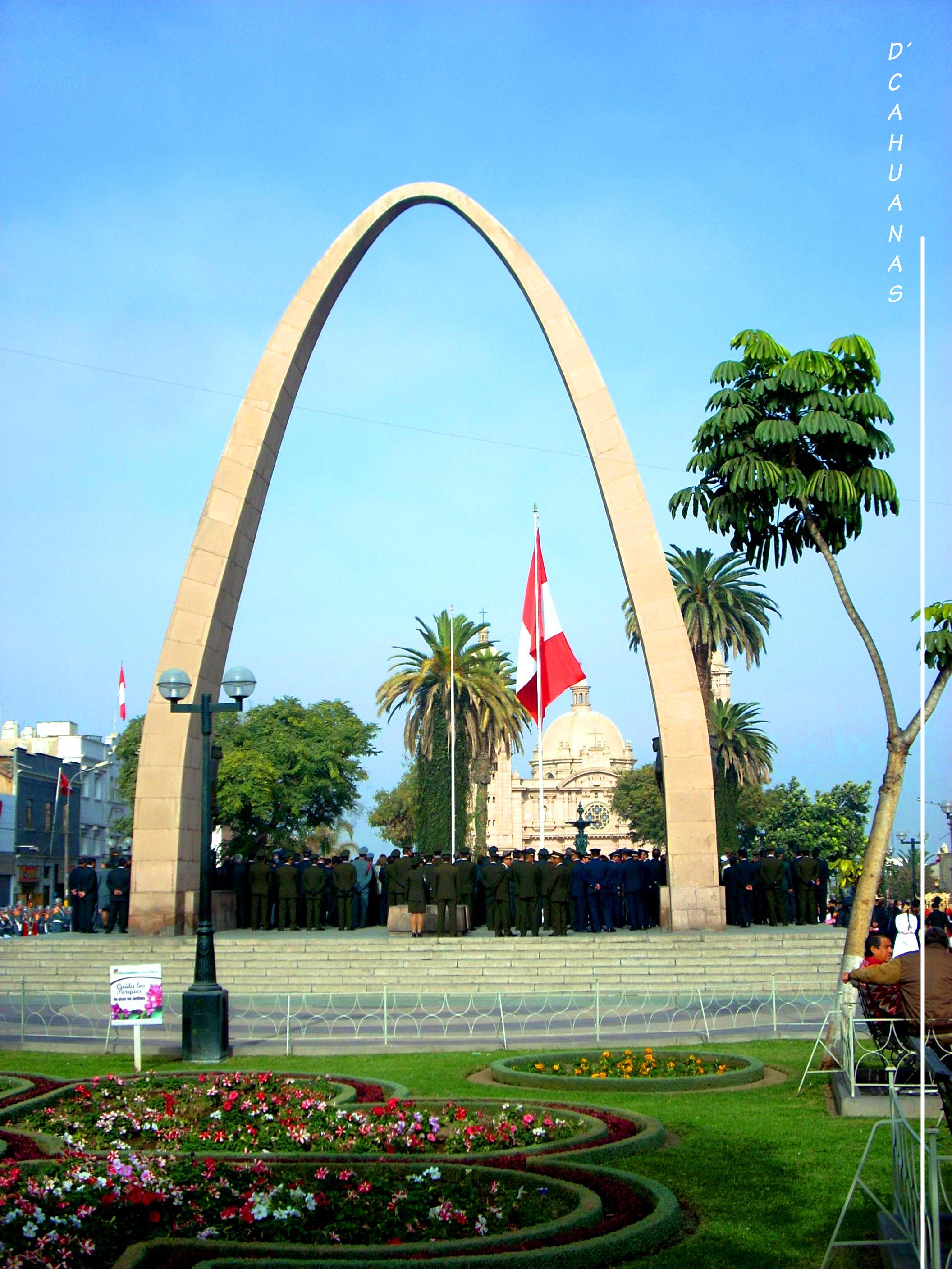 Arco en el centro de tacna